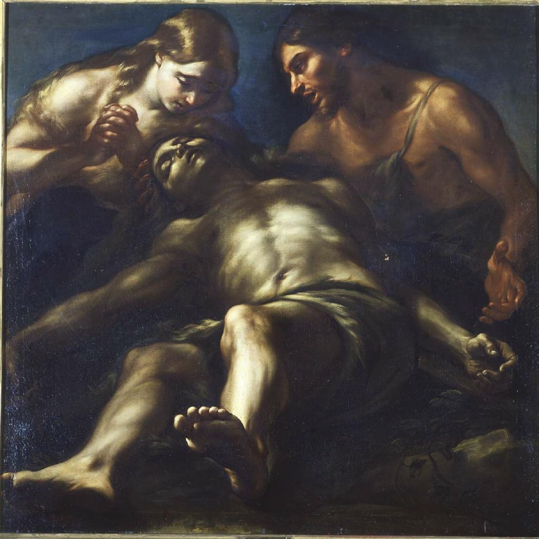 La obra representa a los familiares de Abel, hijo de Adán y Eva, lamentándose por su muerte.